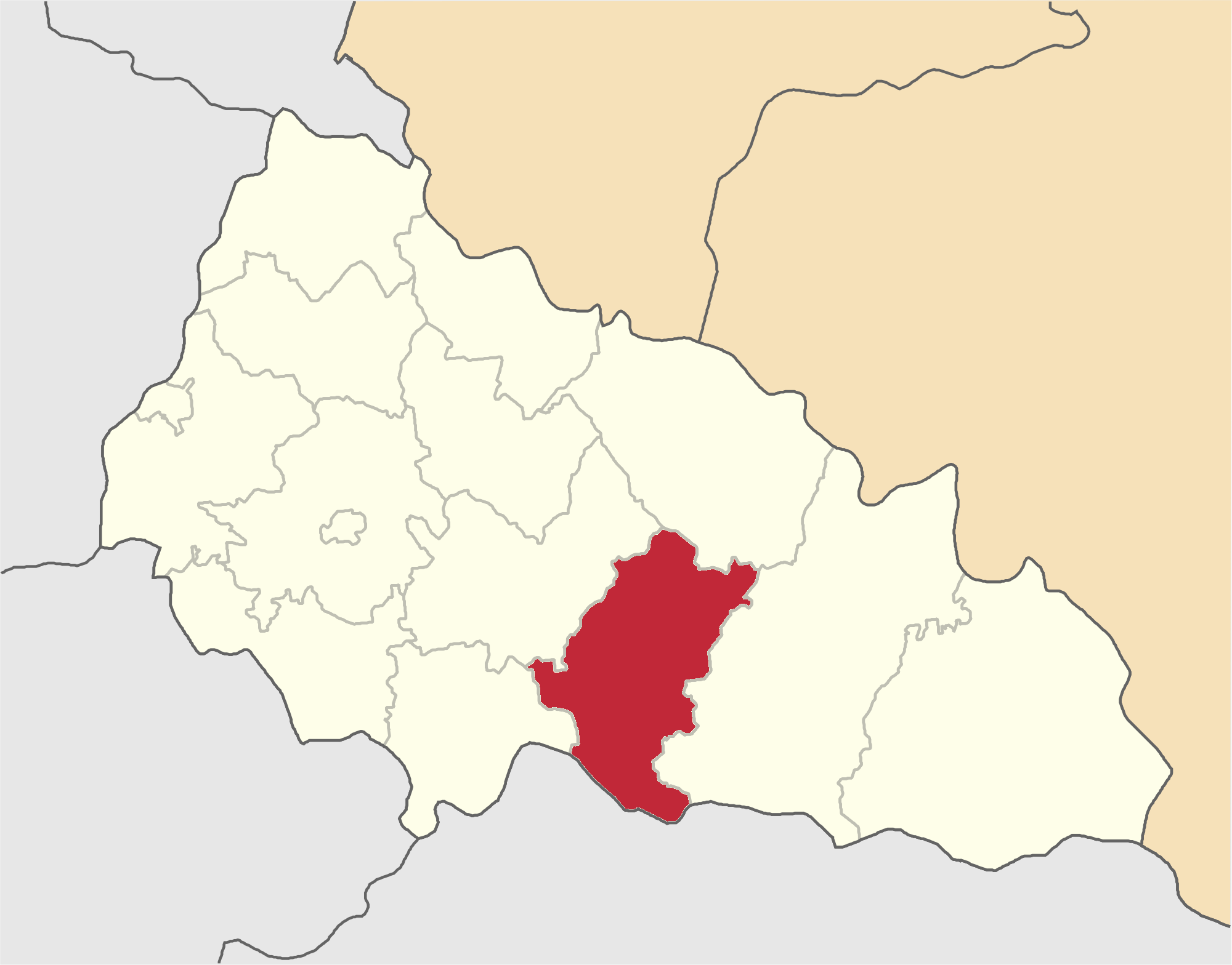 Khustskyi-Raion map